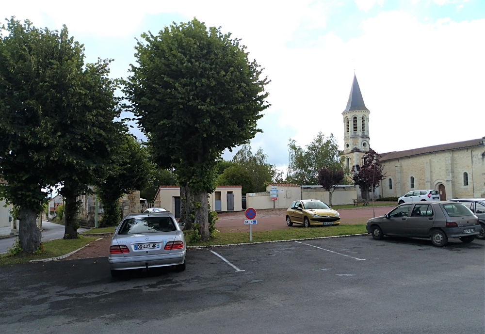 La place de l'église de Cernay dans la Vienne (86)